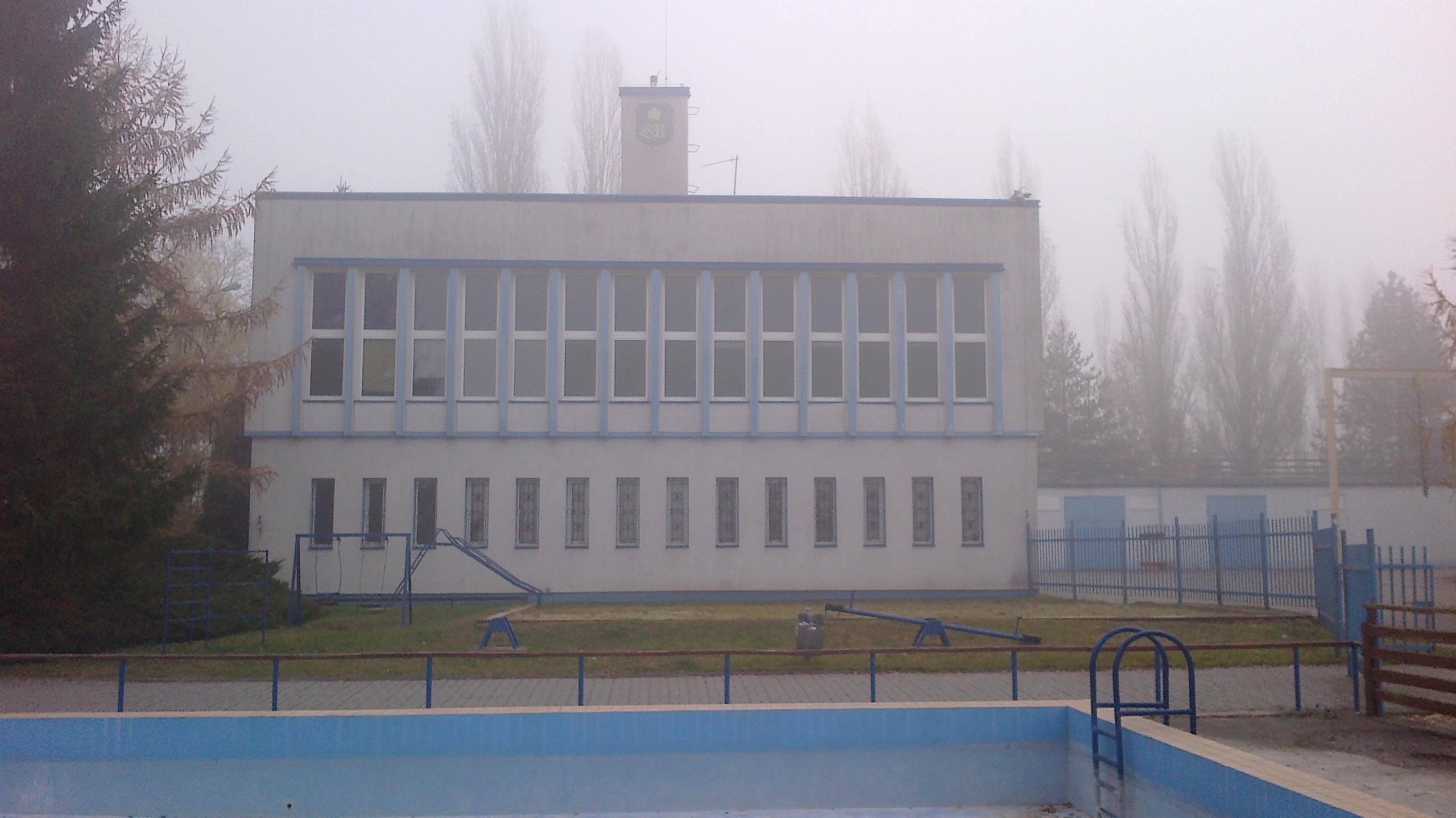 OSiR Janikowo